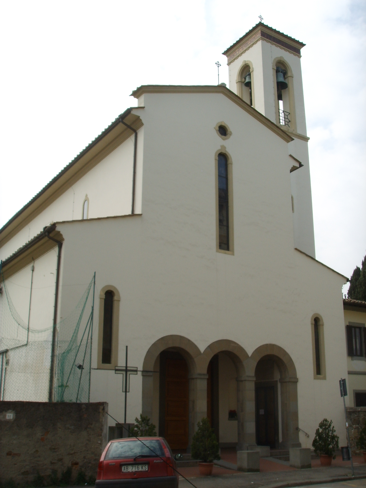 Maria a Coverciano, chiesa nuova